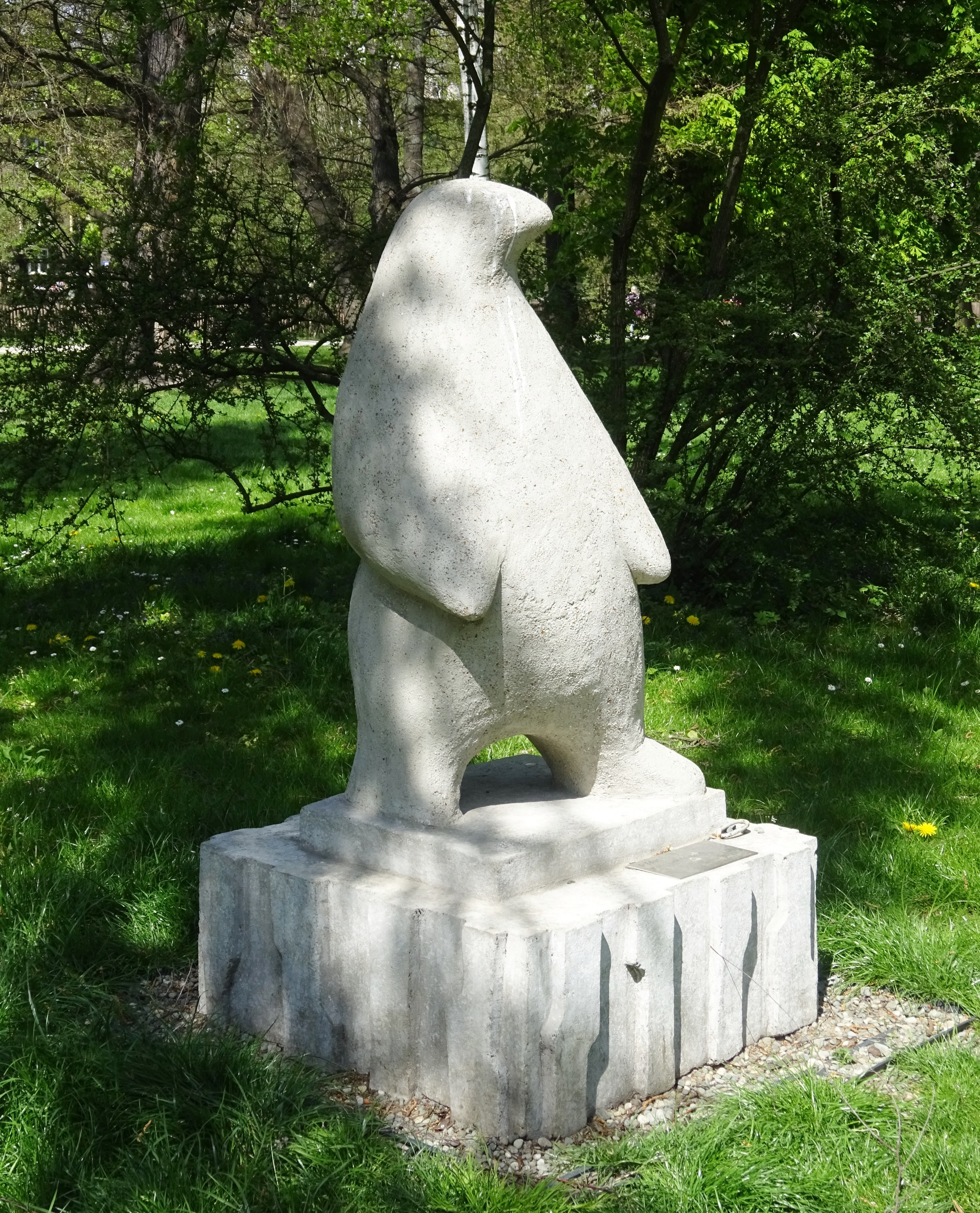 Rzeźba „Ptak”, autorstwa Romana Tarkowskiego z II połowy XX wieku, znajdująca się w Parku Krakowskim w Krakowie.